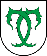 Wappen von Miécourt, Kanton Jura, Schweiz